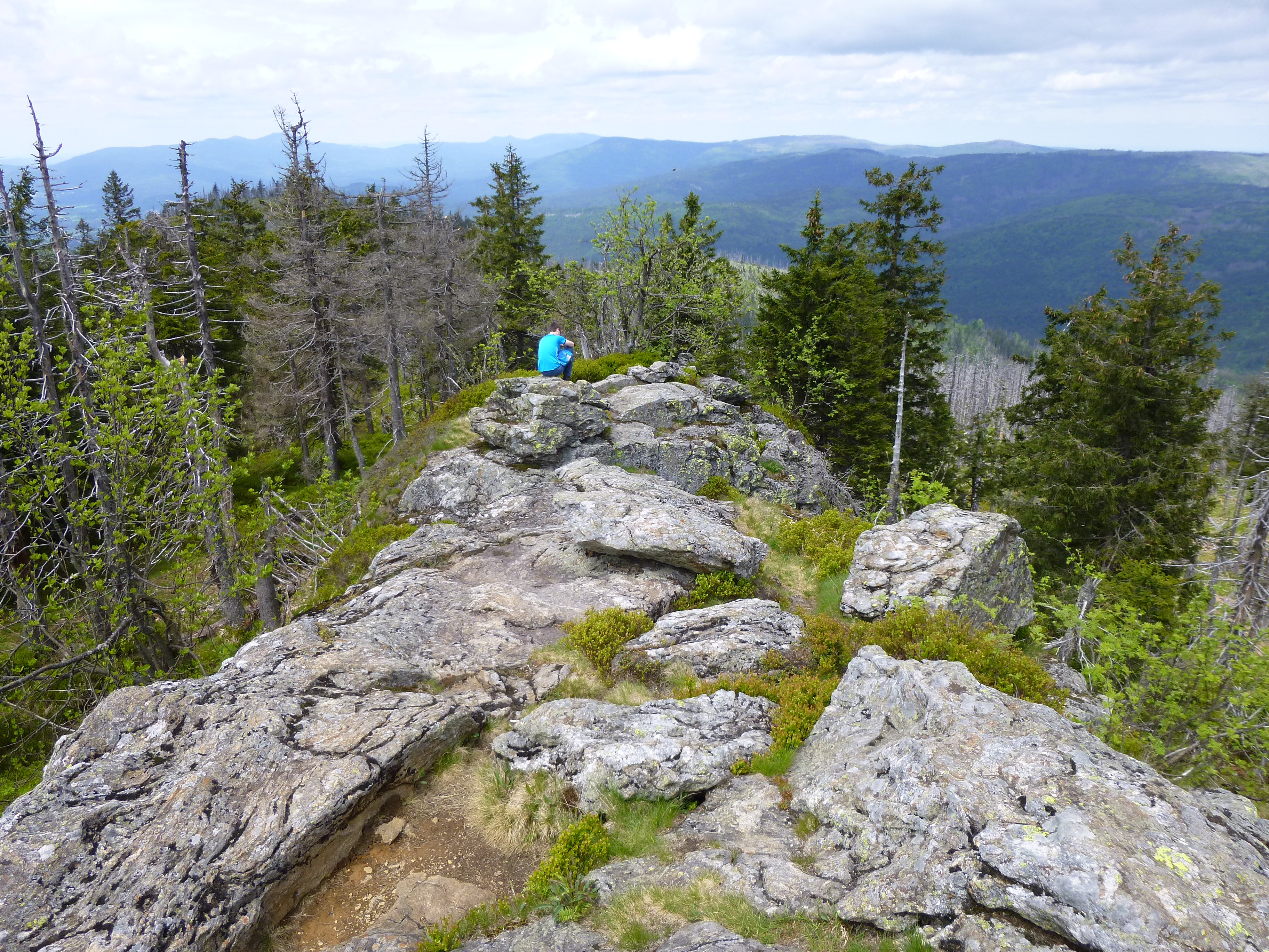 Blick über die Gipfelfelsen des Großen Rachel (1.453 m) in Richtung Tschechien. Nationalpark Bayerischer Wald.